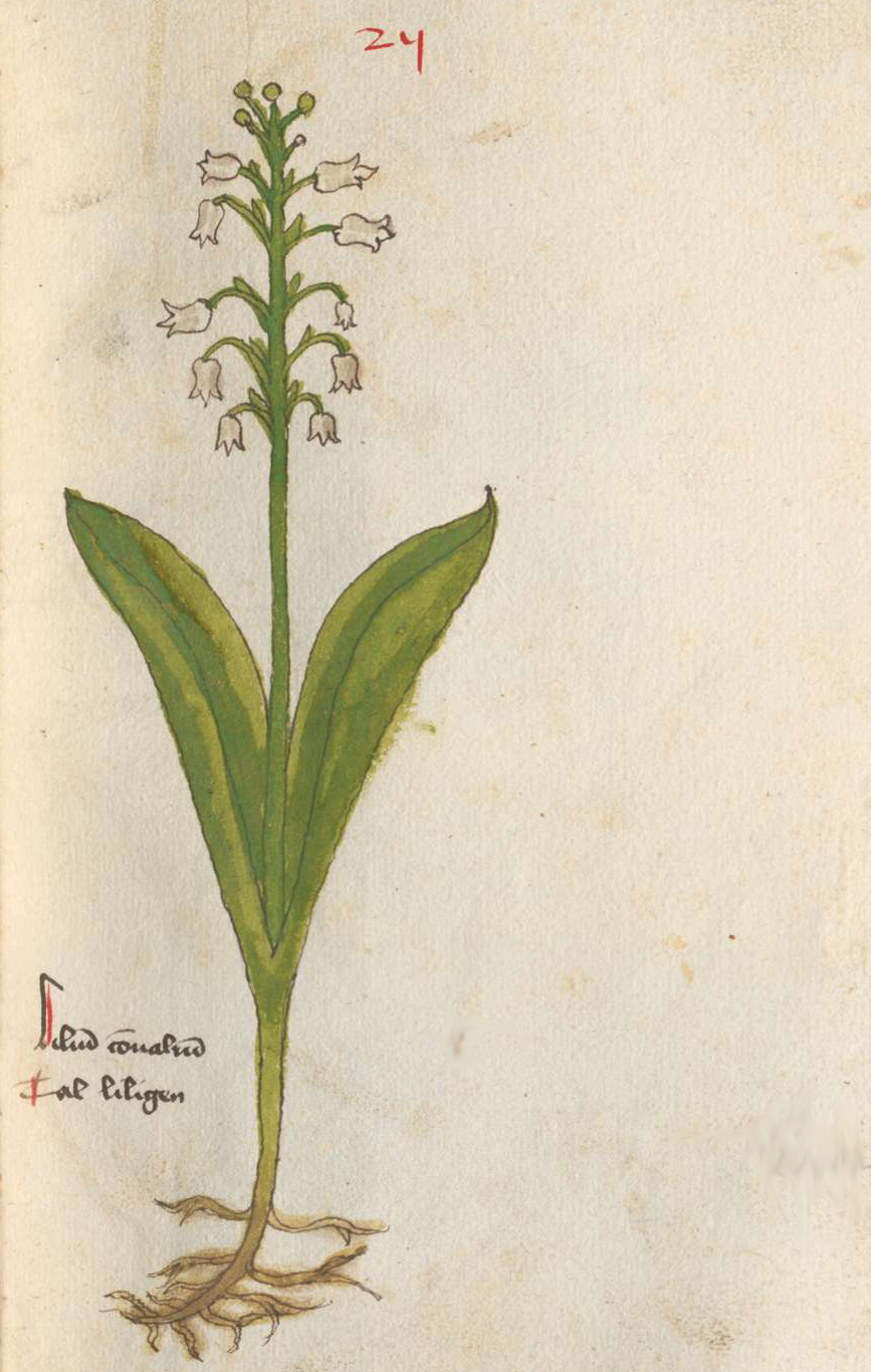 Tal-Lilie